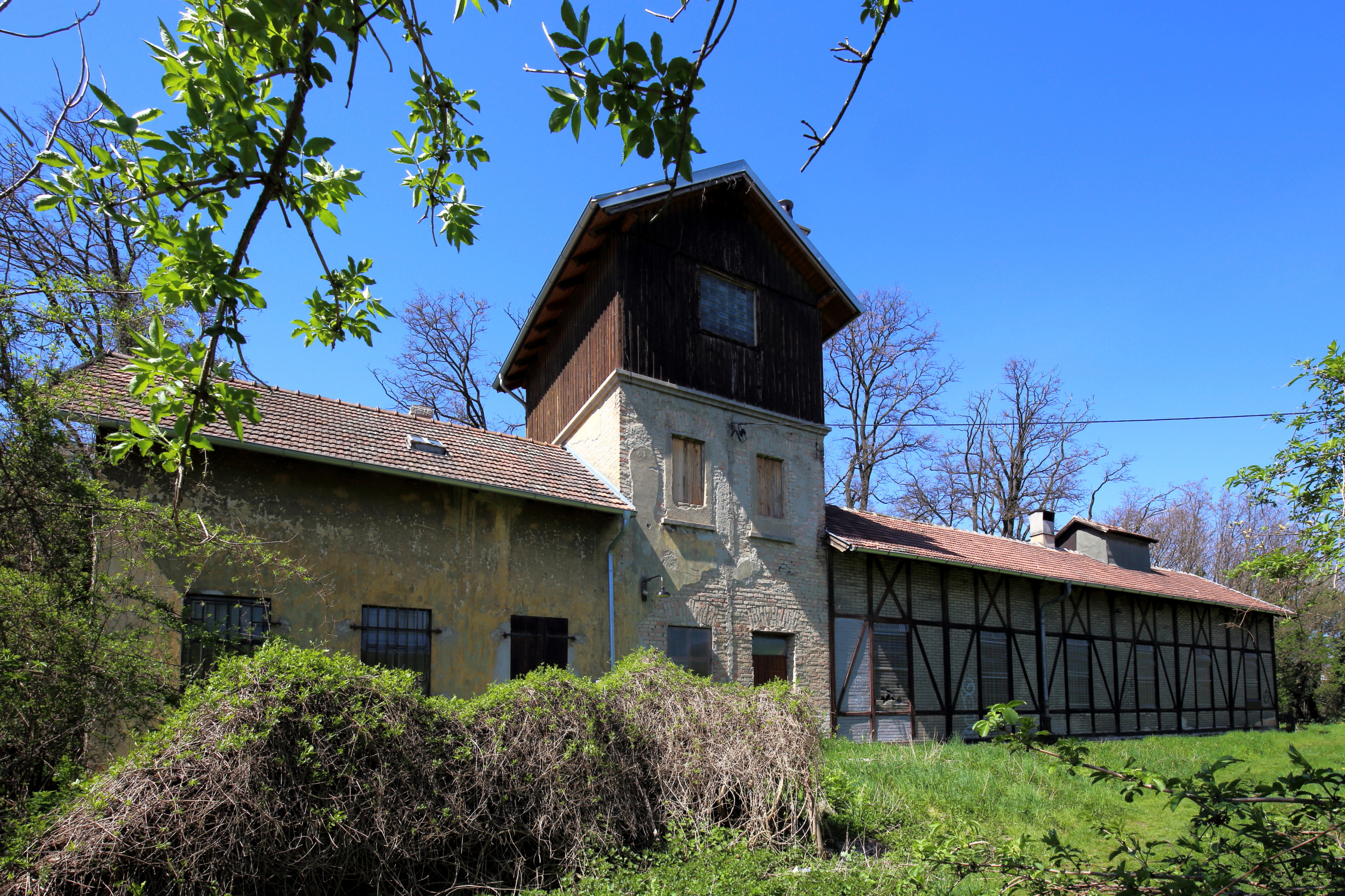 Der denkmalgeschützte Lokschuppen mit Wasserturm in Stammersdorf, ein Ortsteil im 21. Wiener Gemeindebezirk Floridsdorf. Das Gebäude wurde 1913 errichtet und ist teilweise als Fachwerkhaus ausgeführt.